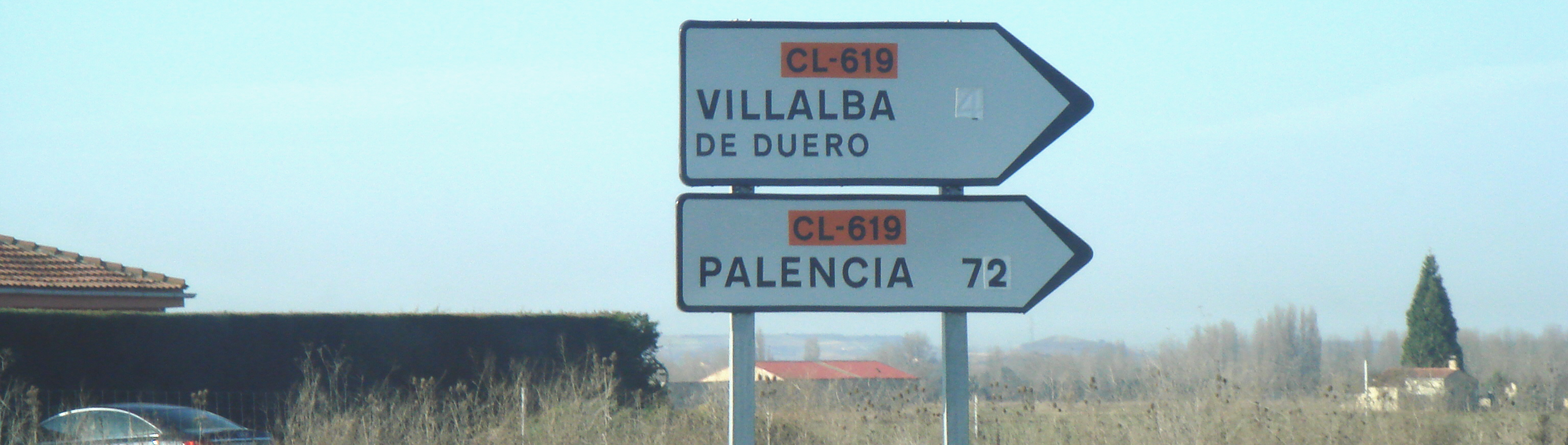 Villalba de Duero, Ribera del Duero, Burgos, Spain, carretera CL-619